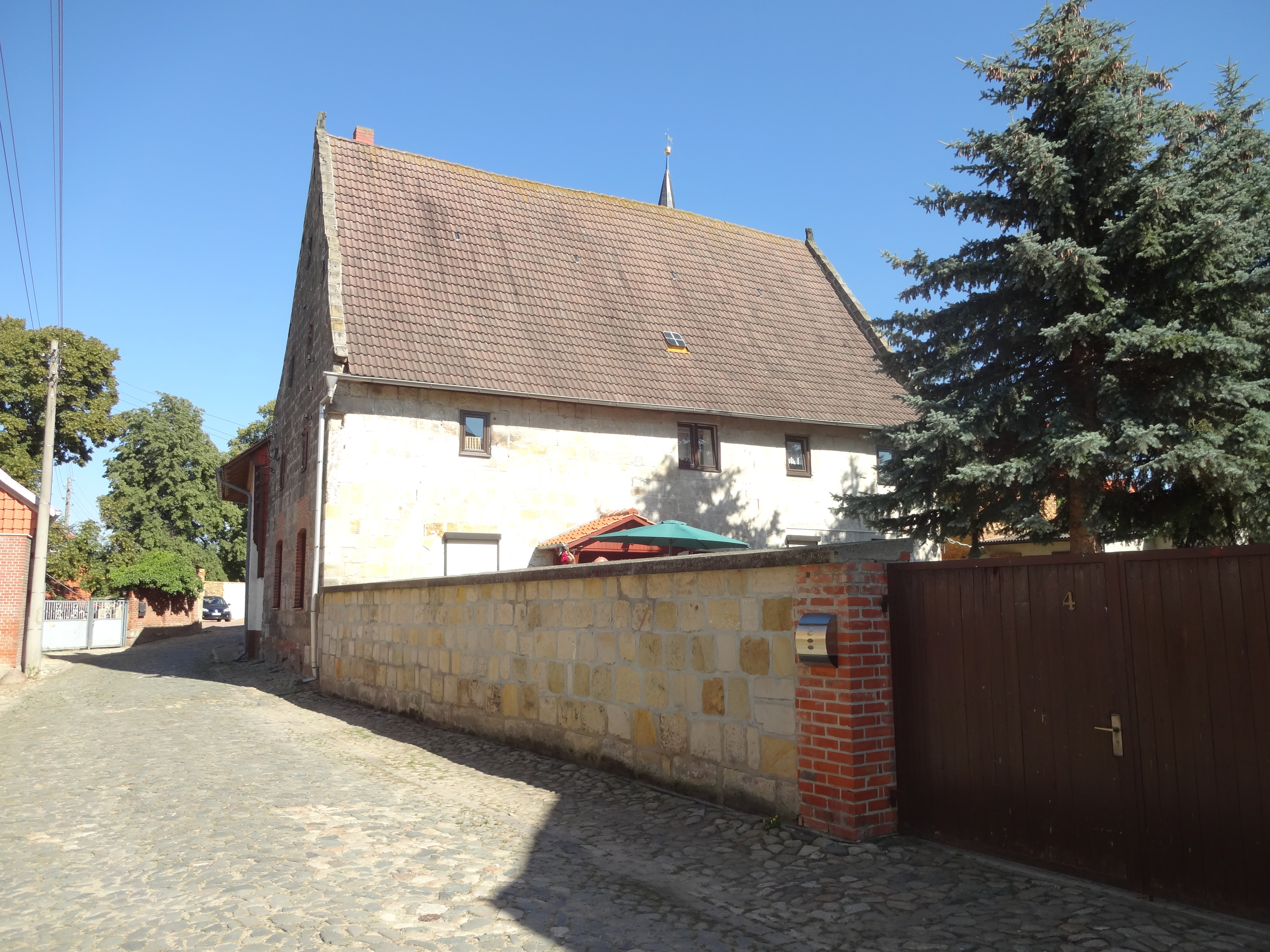 denkmalgeschütztes Wohnhaus in der Kirchstraße 4 in Harsleben